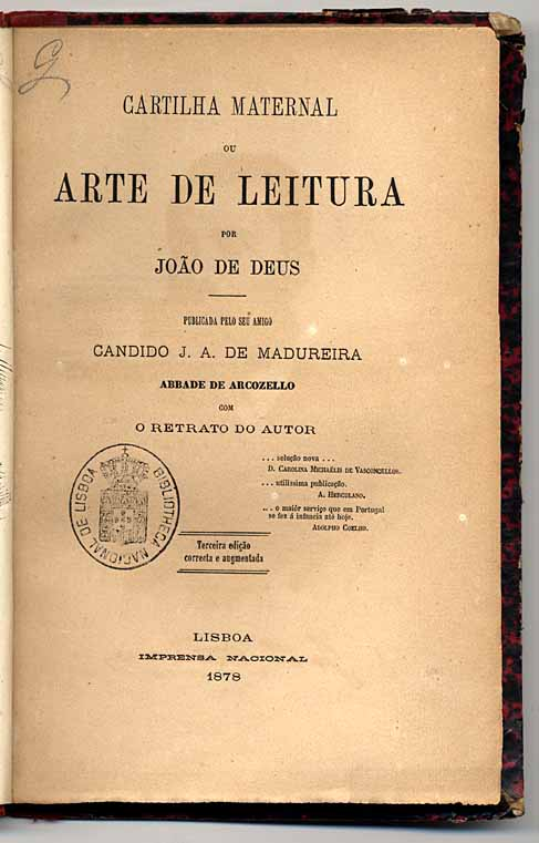 Rosto da Cartilha Maternal de João de Deus de Nogueira Ramos